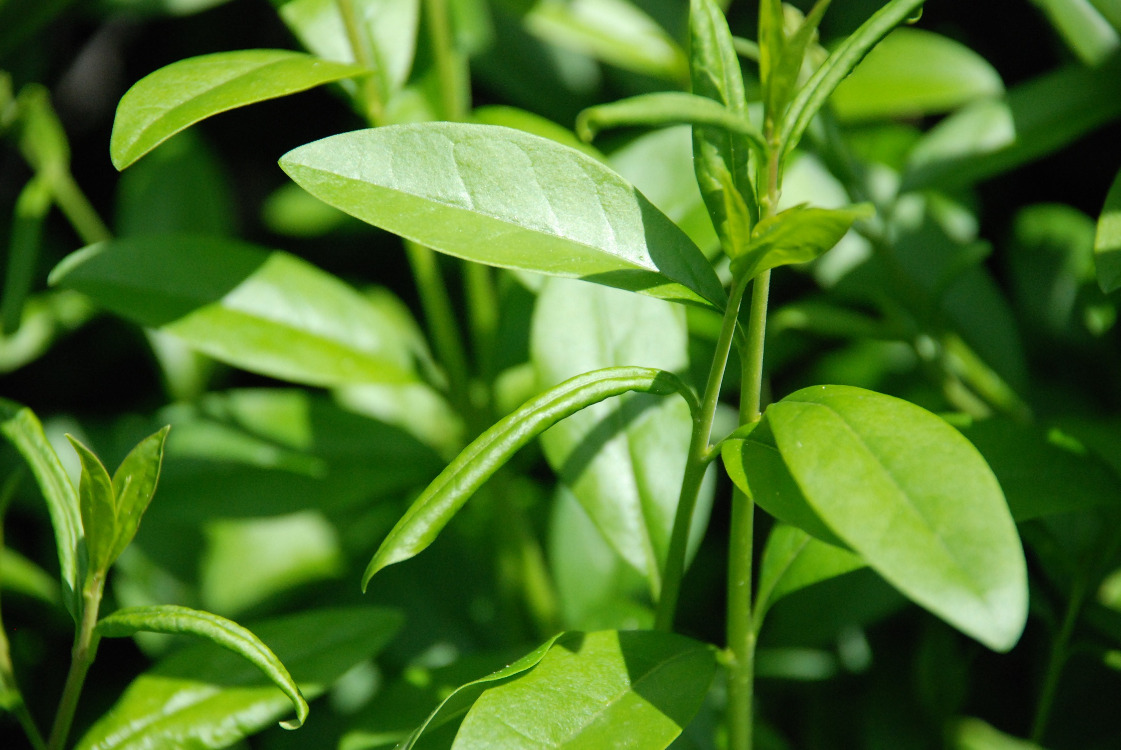 Myzus ligustri Mosley